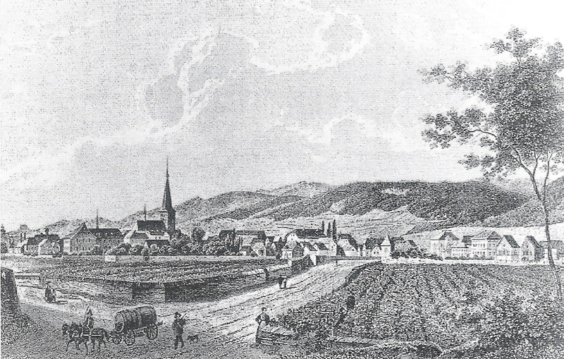 Deidesheim von Nordosten gesehen, um 1840